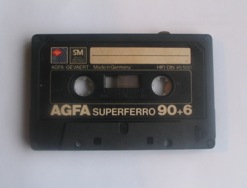 Agfa C90+6 cassette